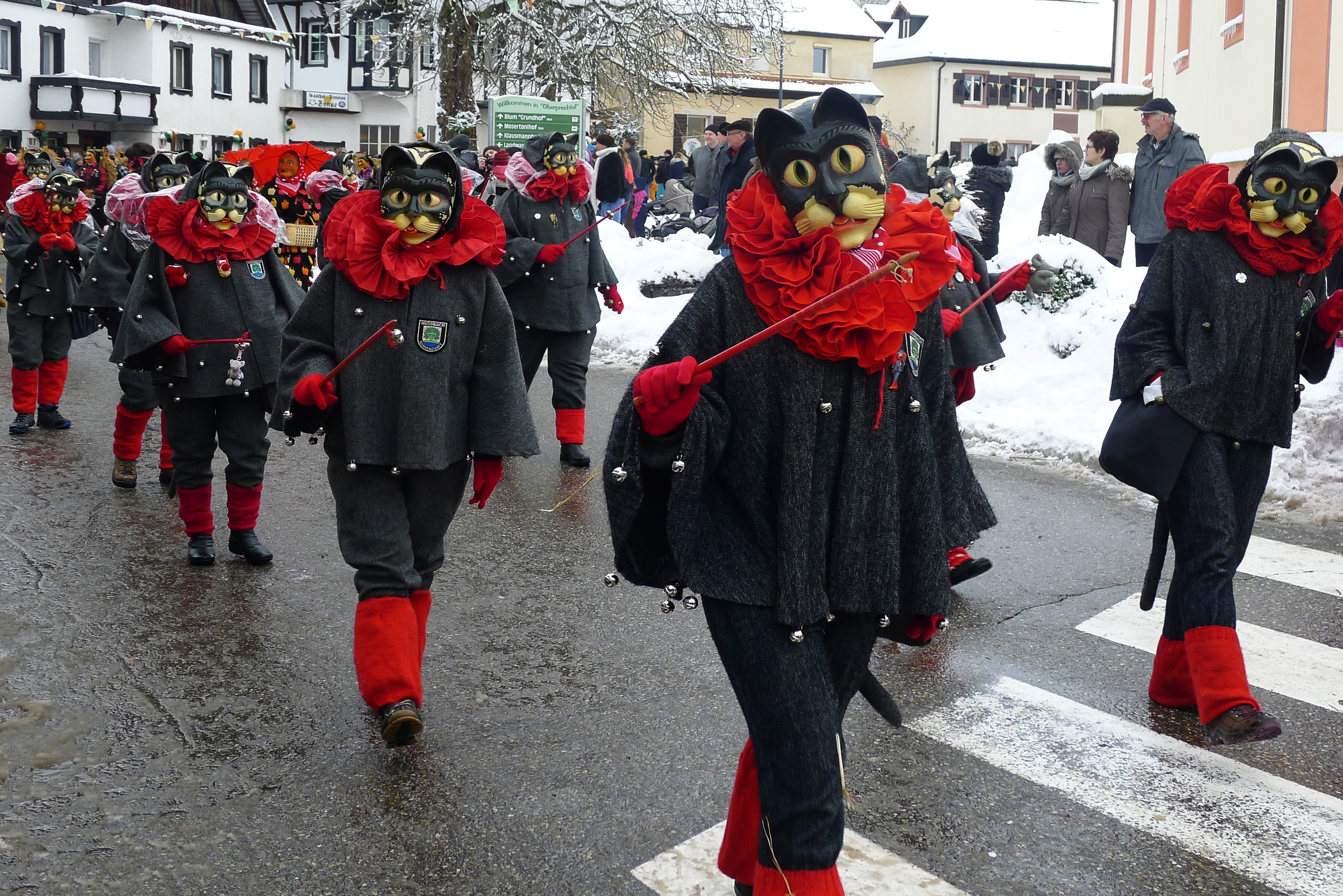 Katzen, Häsfigur der Narrenzunft Nußbach e.V. beim Jubiläumsumzug 40 Jahre Narrenzunft Bergteufel Oberprechtal e.V. am 15. Januar 2017